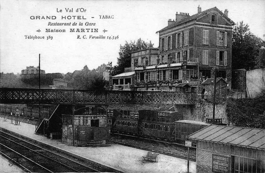 Intérieur de la gare du Val d'Or vers 1920 avec à droite les voies de garages reliées au nouvel embranchement.